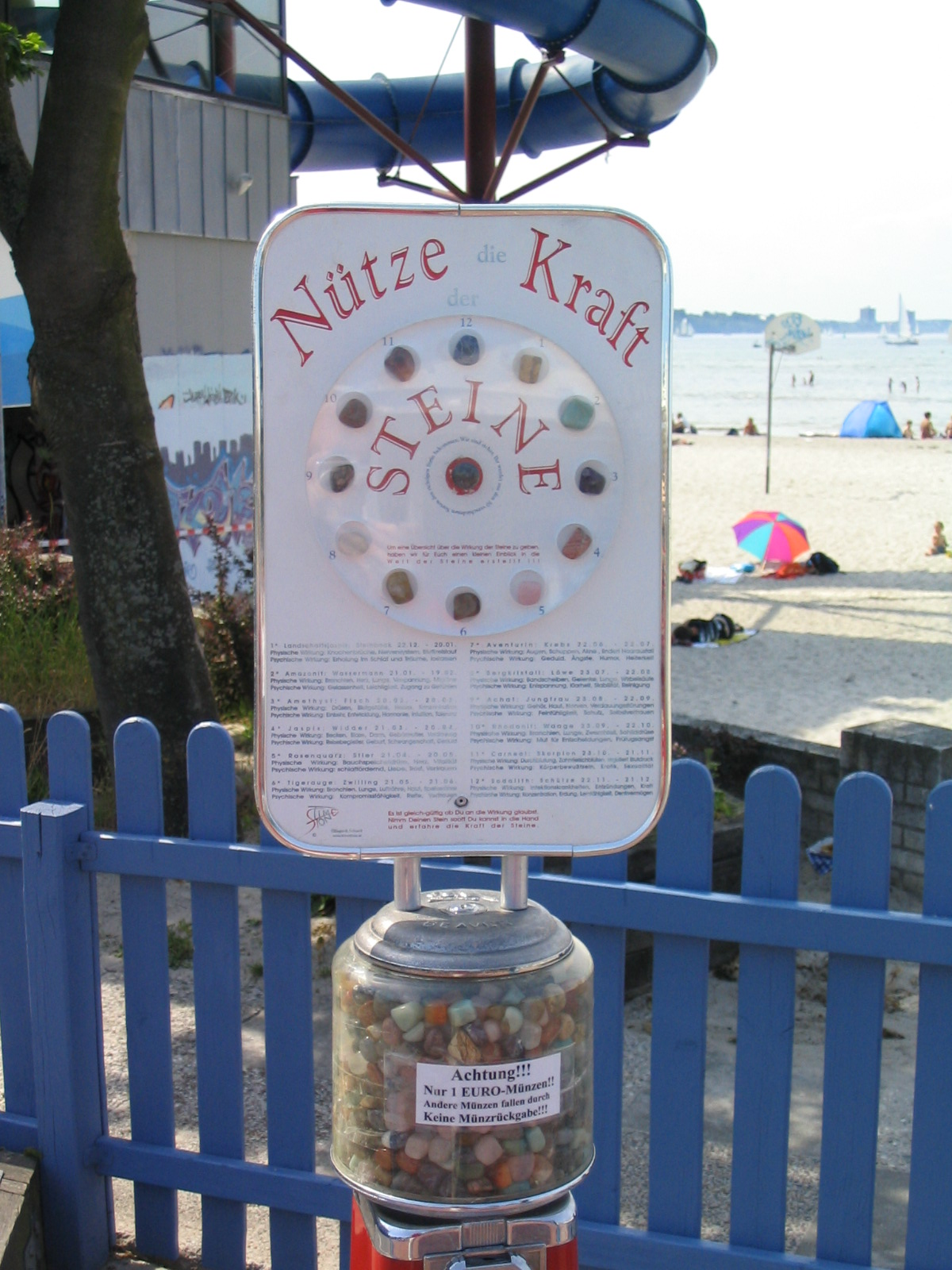 Heilsteinverkaufsautomat Kiel-Laboe